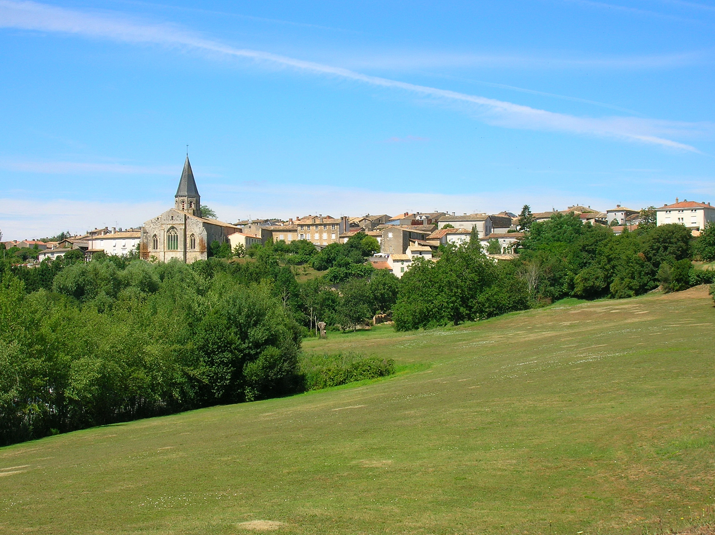 Vue sud de Champdeniers